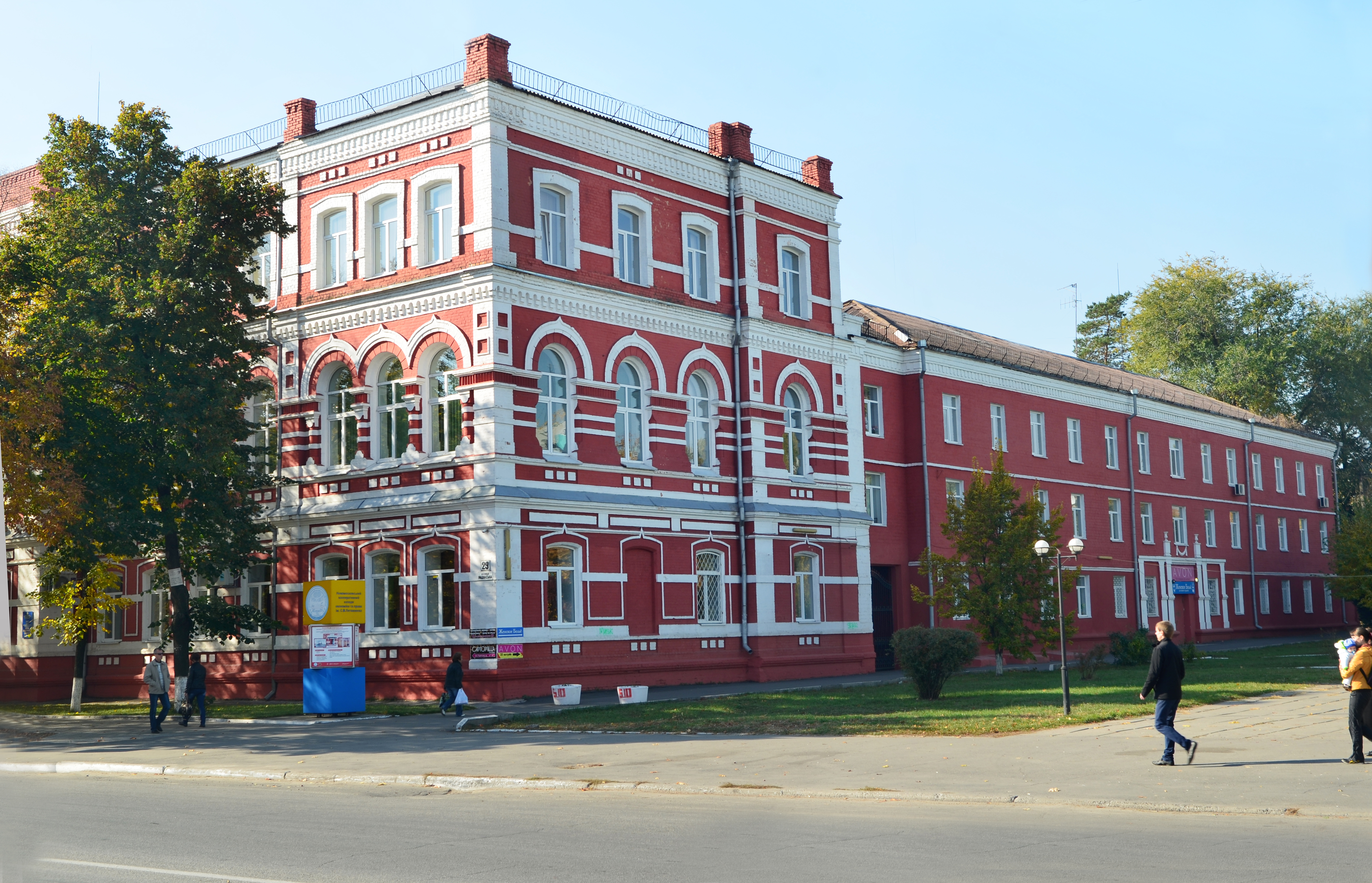 навчальний корпус Новомосковського кооперативного технікуму, Новомосковськ, вул. Радянська, 29